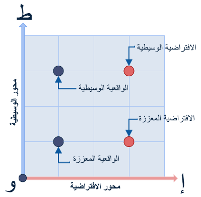 خط بياني يشرح العلاقي بين الوسيطية والافتراضية